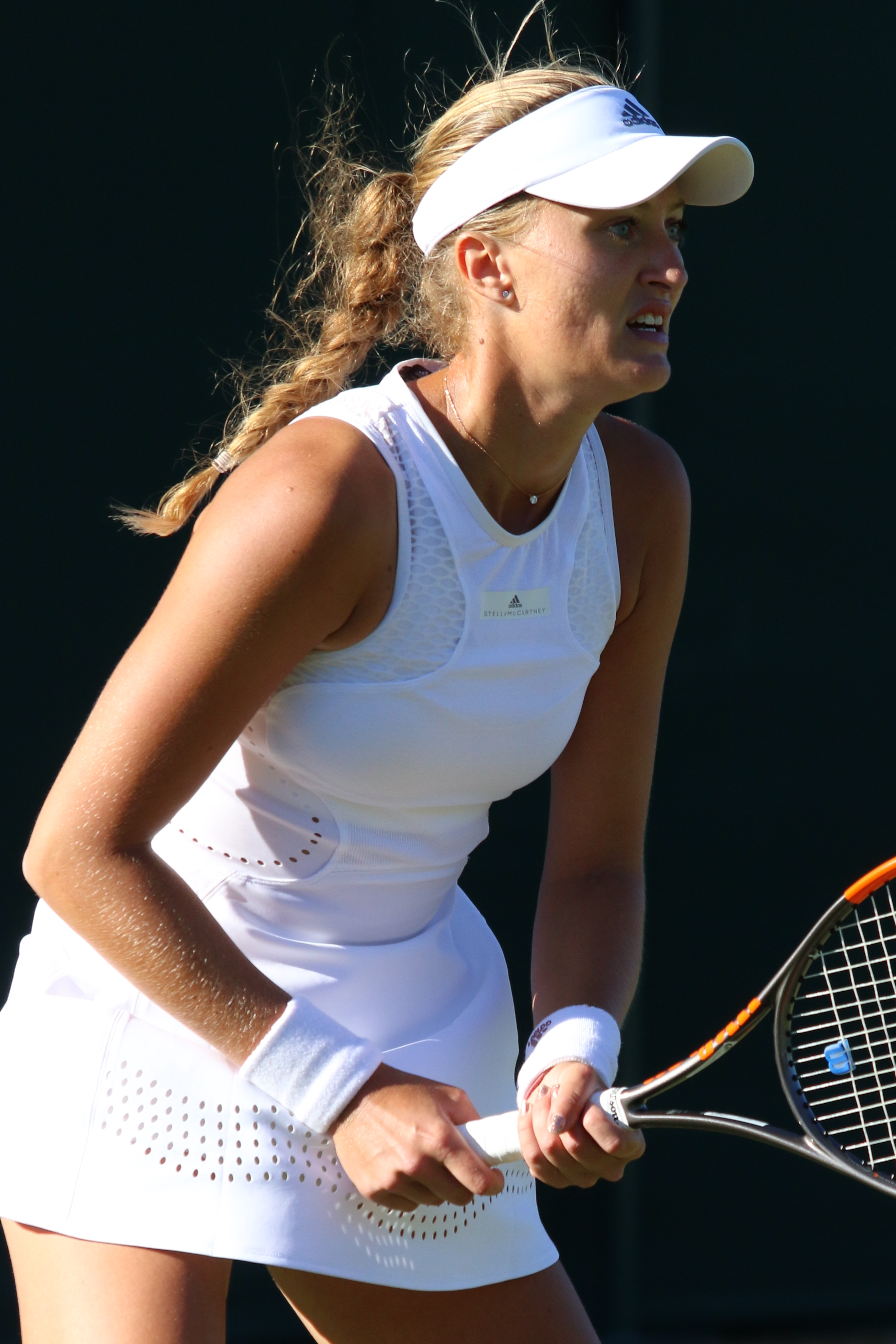 Mladenovic WM18 (14)